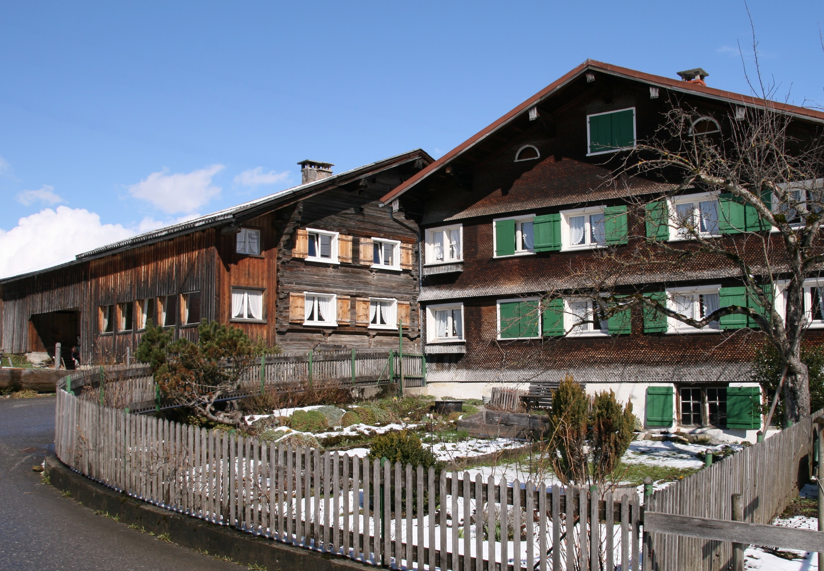 aus dem DEHIO Vorarlberg 1983: Bregenzerwälderhof Nr. 73 (Hub): Einhof, Wohnteil 17. Jh., gestrickter Blockbau mit Flurküchengrundriß und flach geneigtem Satteldach, traufseitiger Schopf; Stirnseite über abgefastem Sohlbankbalken leicht vorkragend, darunter Zierkonsolen; gestufte Seitenpfetten, im Giebel ausgesägte Kreuze. *** Nr. 72 rechts: Bregenzerwälderhof (Einhof) des 19. Jhs. In Egg, Vorarlberg.